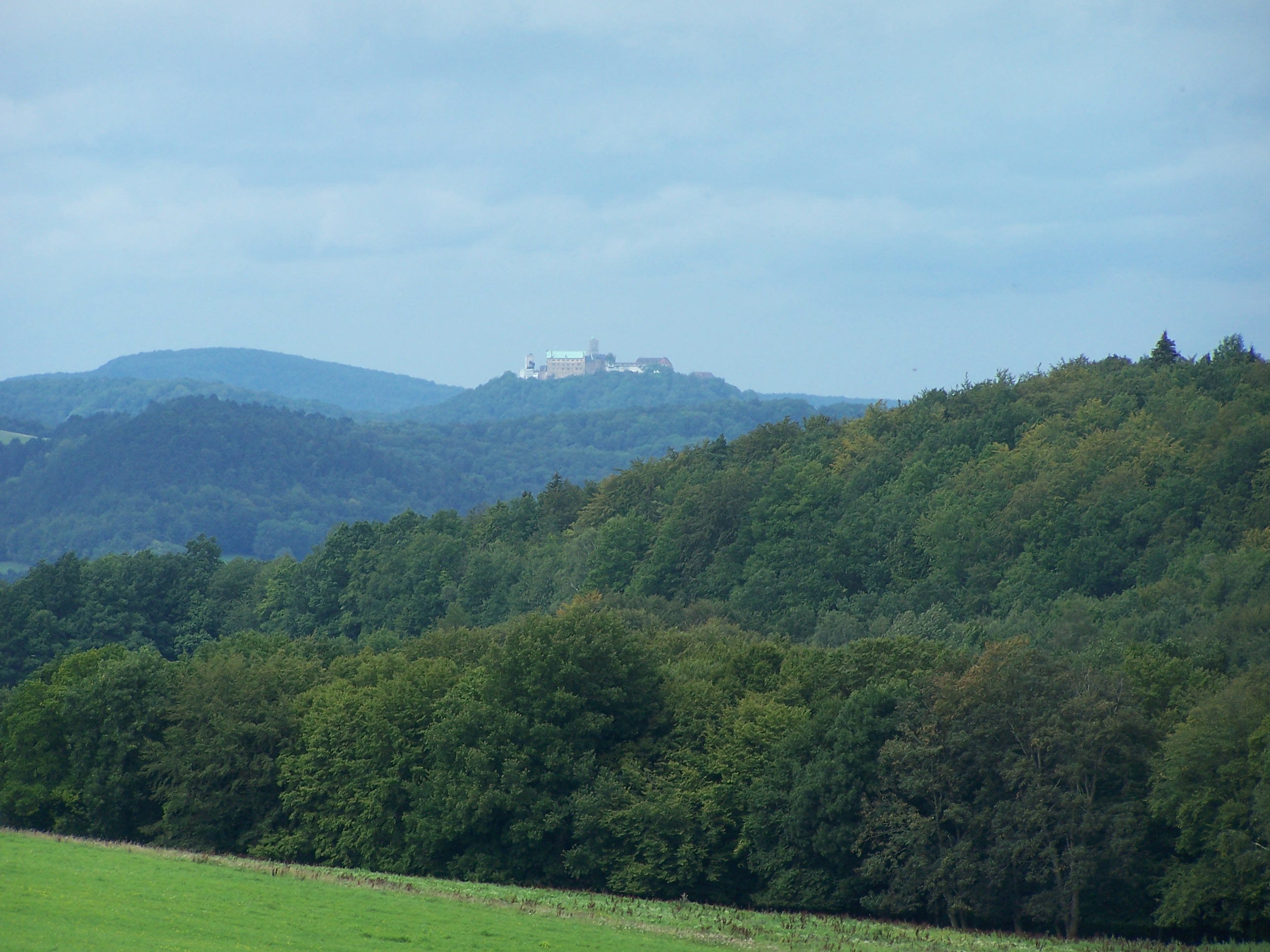 Der Wartburgblick von der Jagdhütte bei Burbach/Wutha-Farnroda.